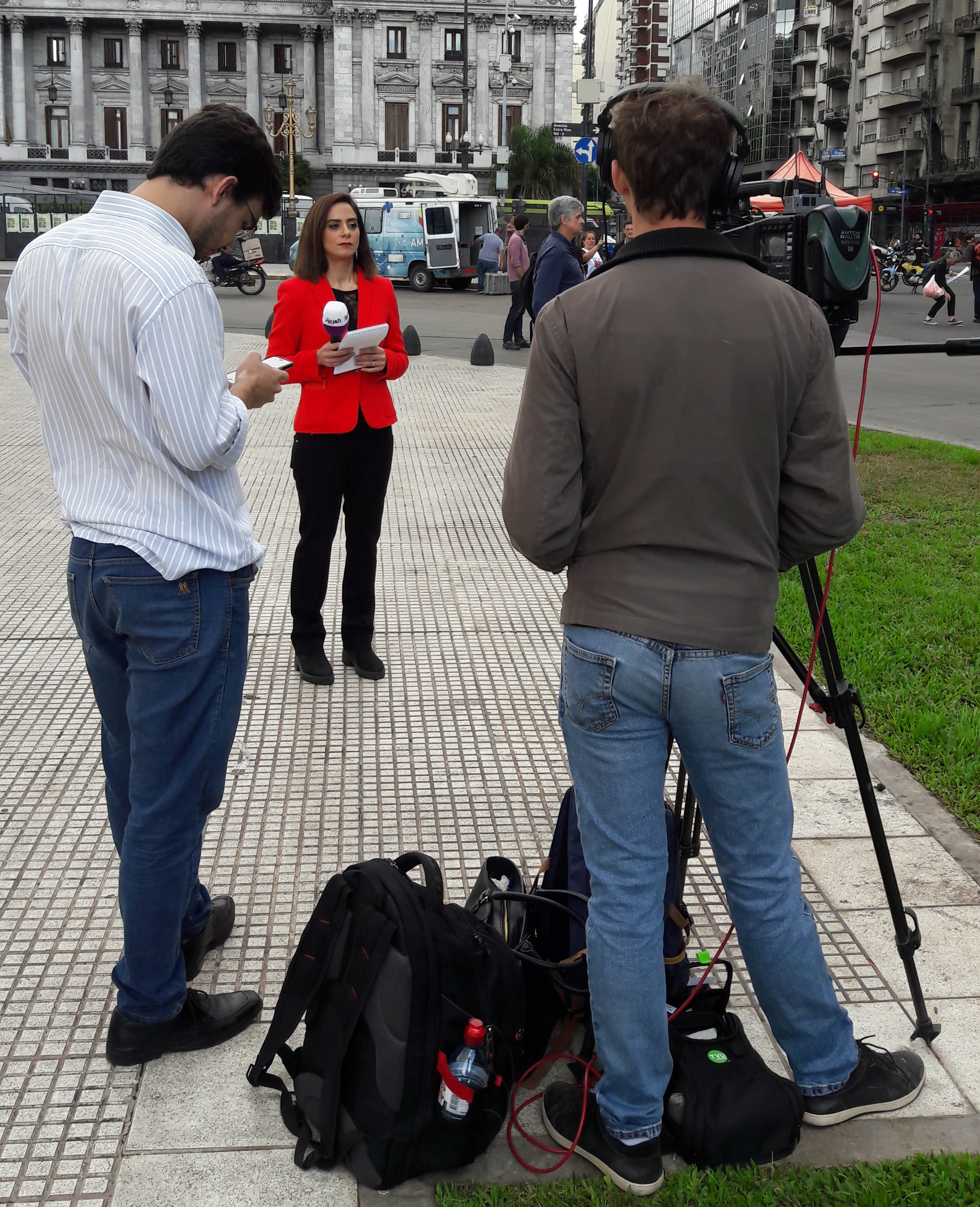 Manifestación contra el G20 y el FMI en Buenos Aires.